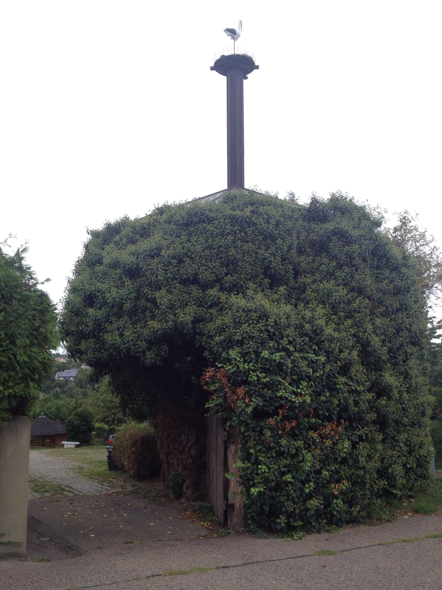 Wasserturm des Moerickestifts in Neuenstadt am Kocher. Das Moerickestift hatte seine eigene Wasserversorgung aus Bürg und daher auch diesen, an der höchsten Stelle des einstigen Gartens befindlichen Wasserturm.